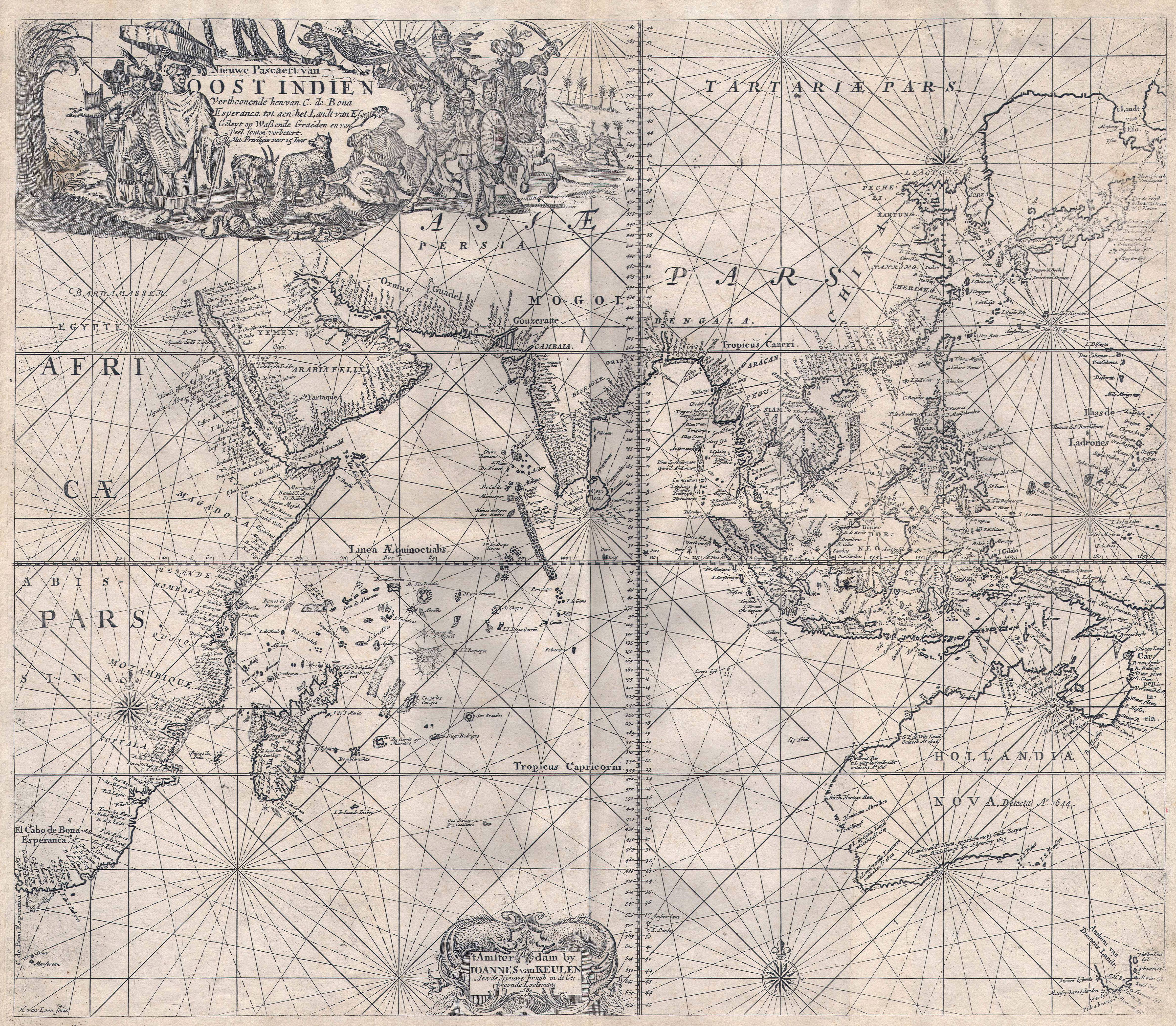 High definition "Paskaart van Oost Indie"